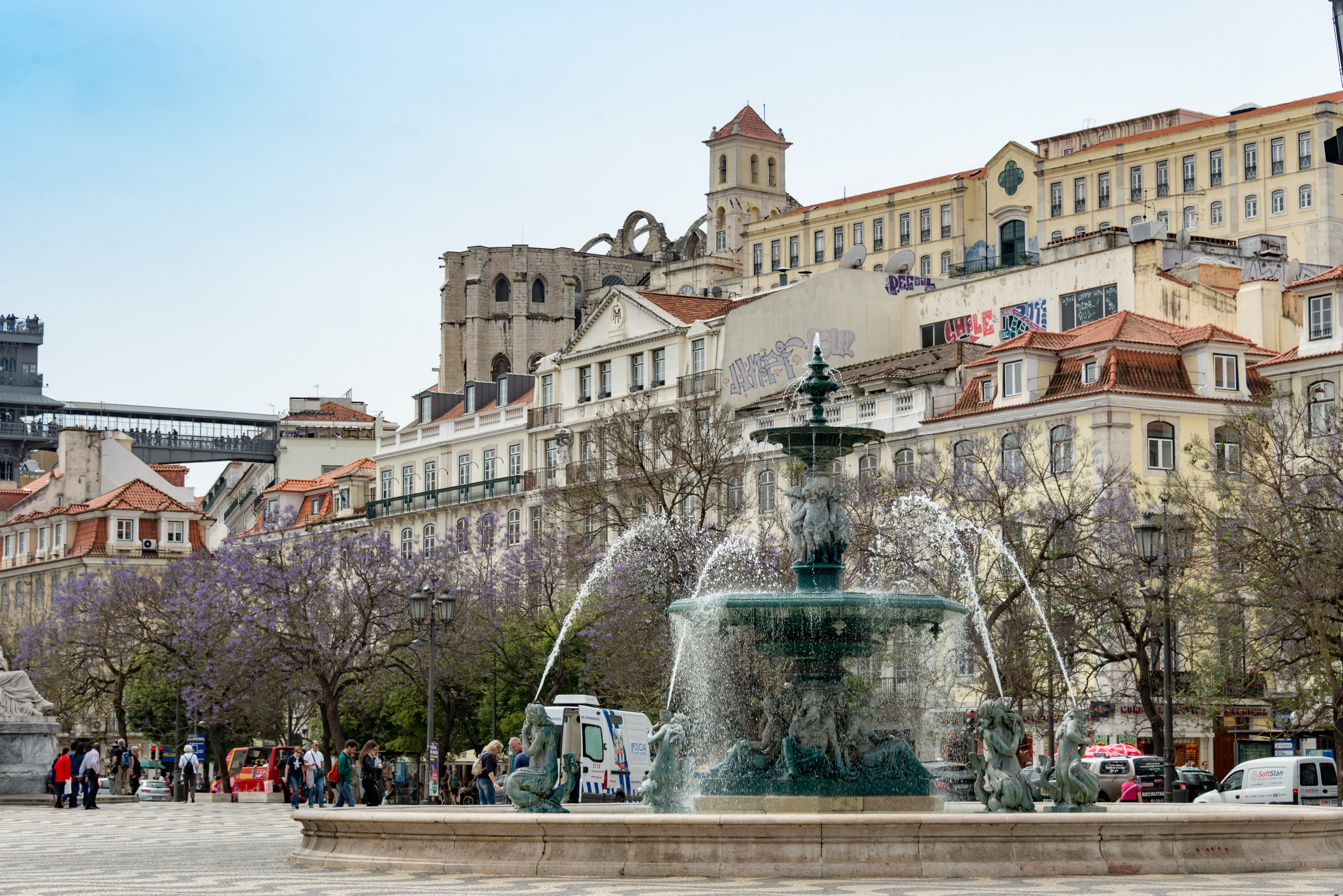 33865-Lisbon